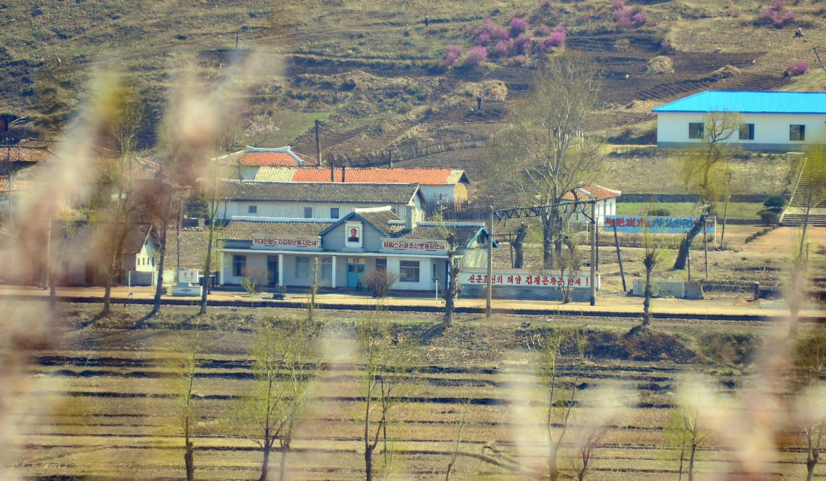 咸镜北道丰利站